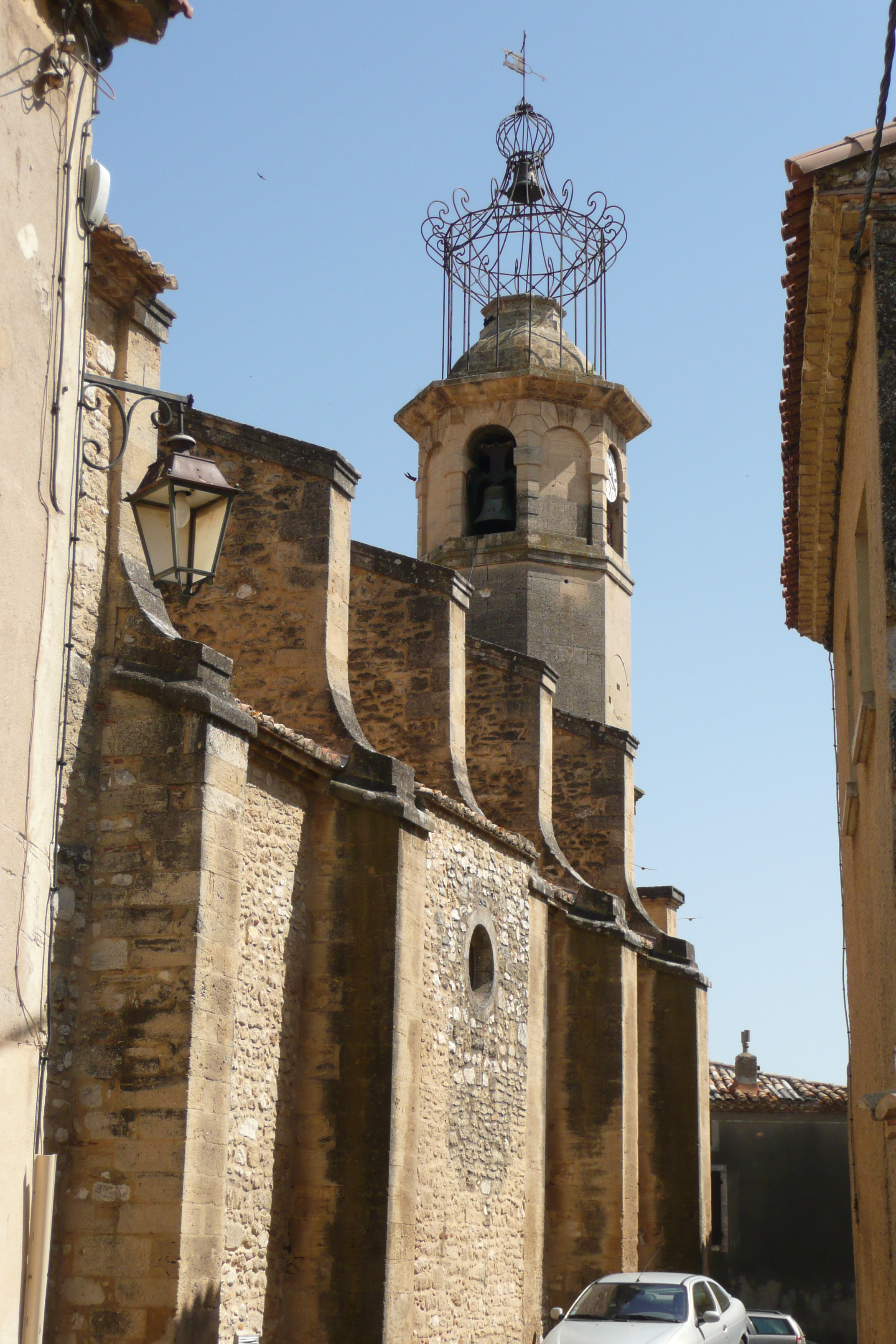 Eglise à Fournès.